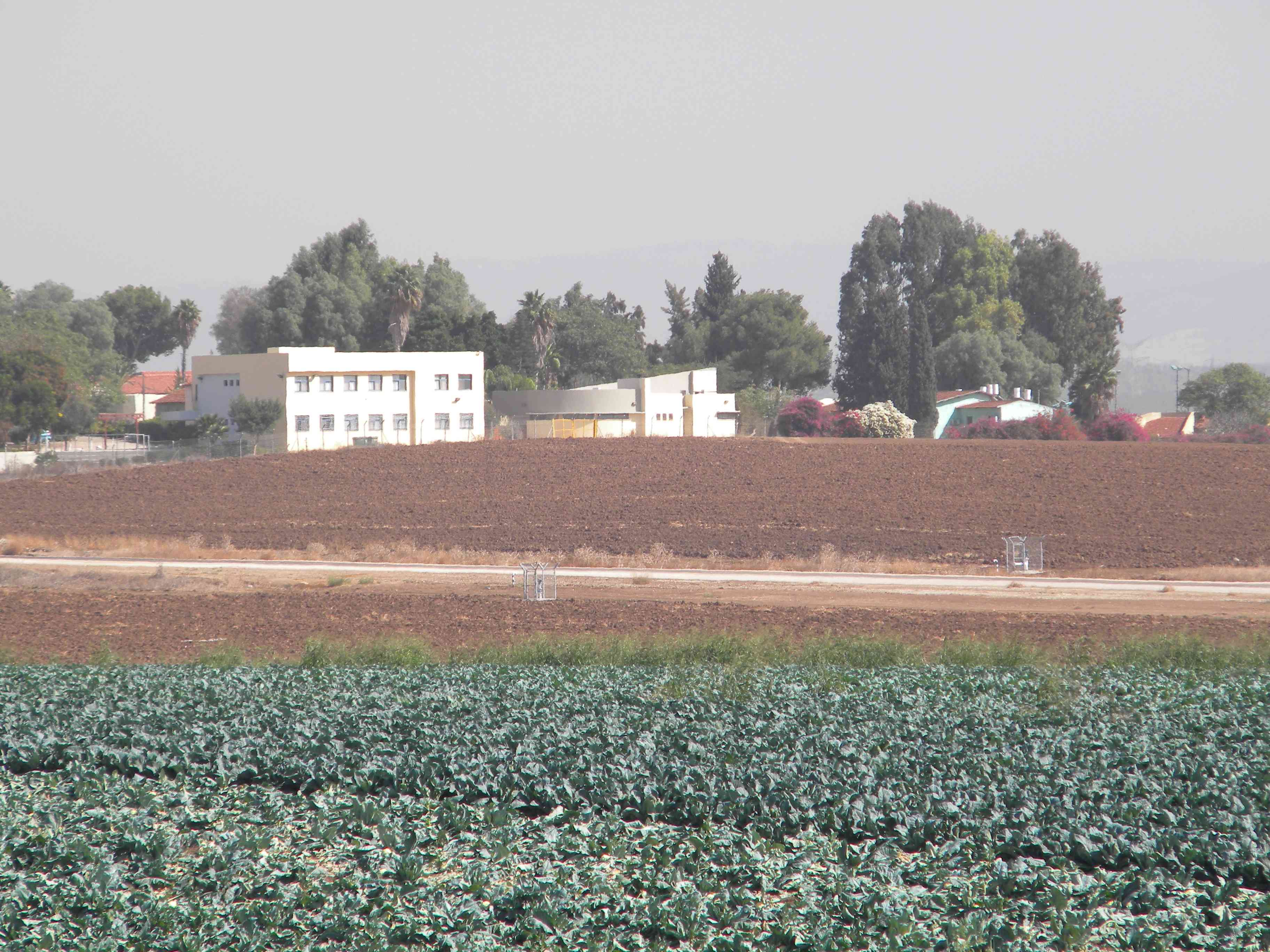 כפר הנוער קדמה - מבנה בית הספר